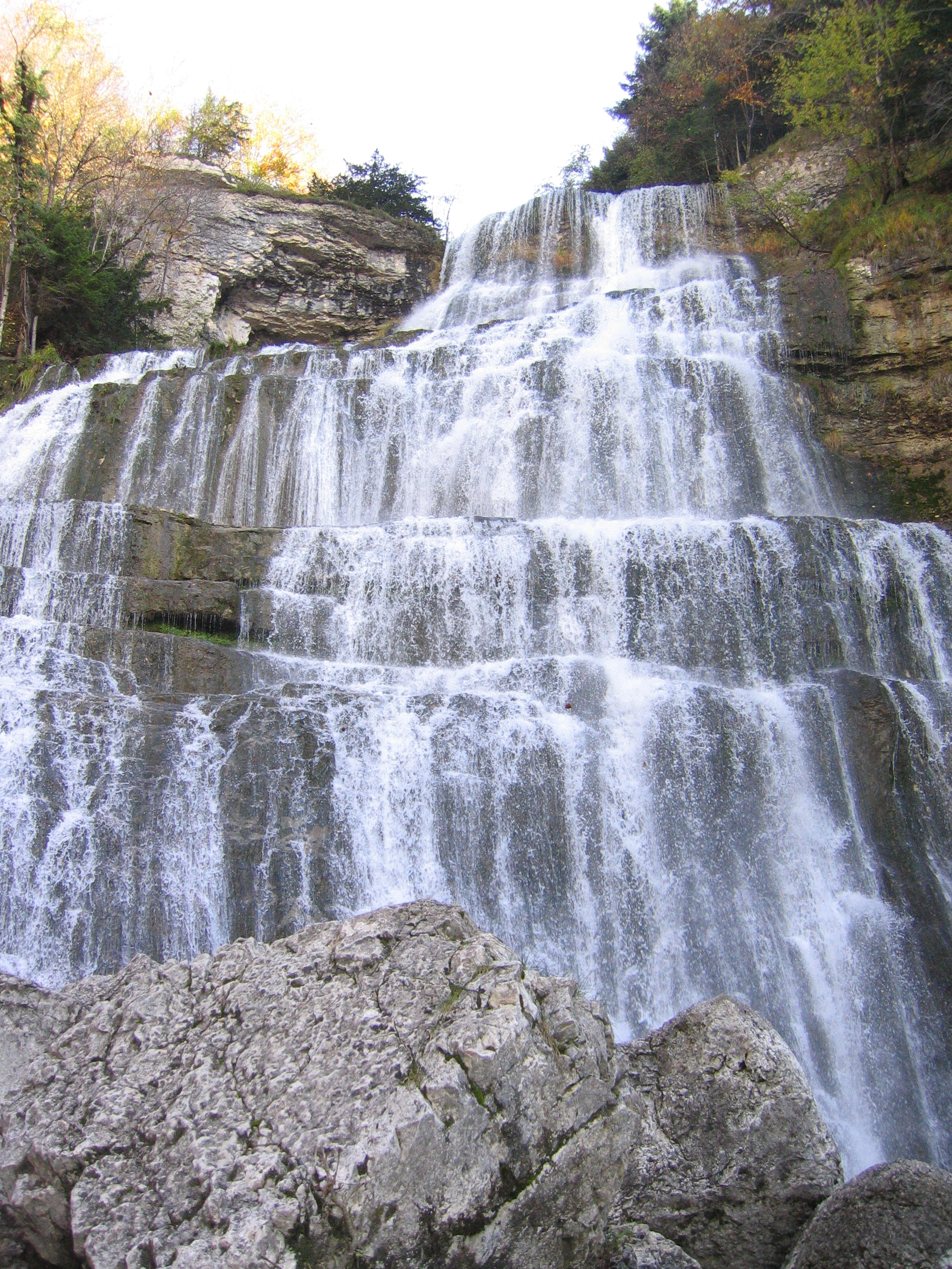 Chute cascade du hérisson